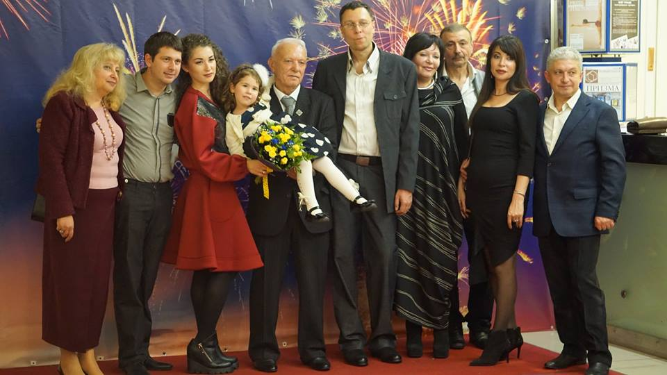 Шварцман Роман Маркович со своей семьей